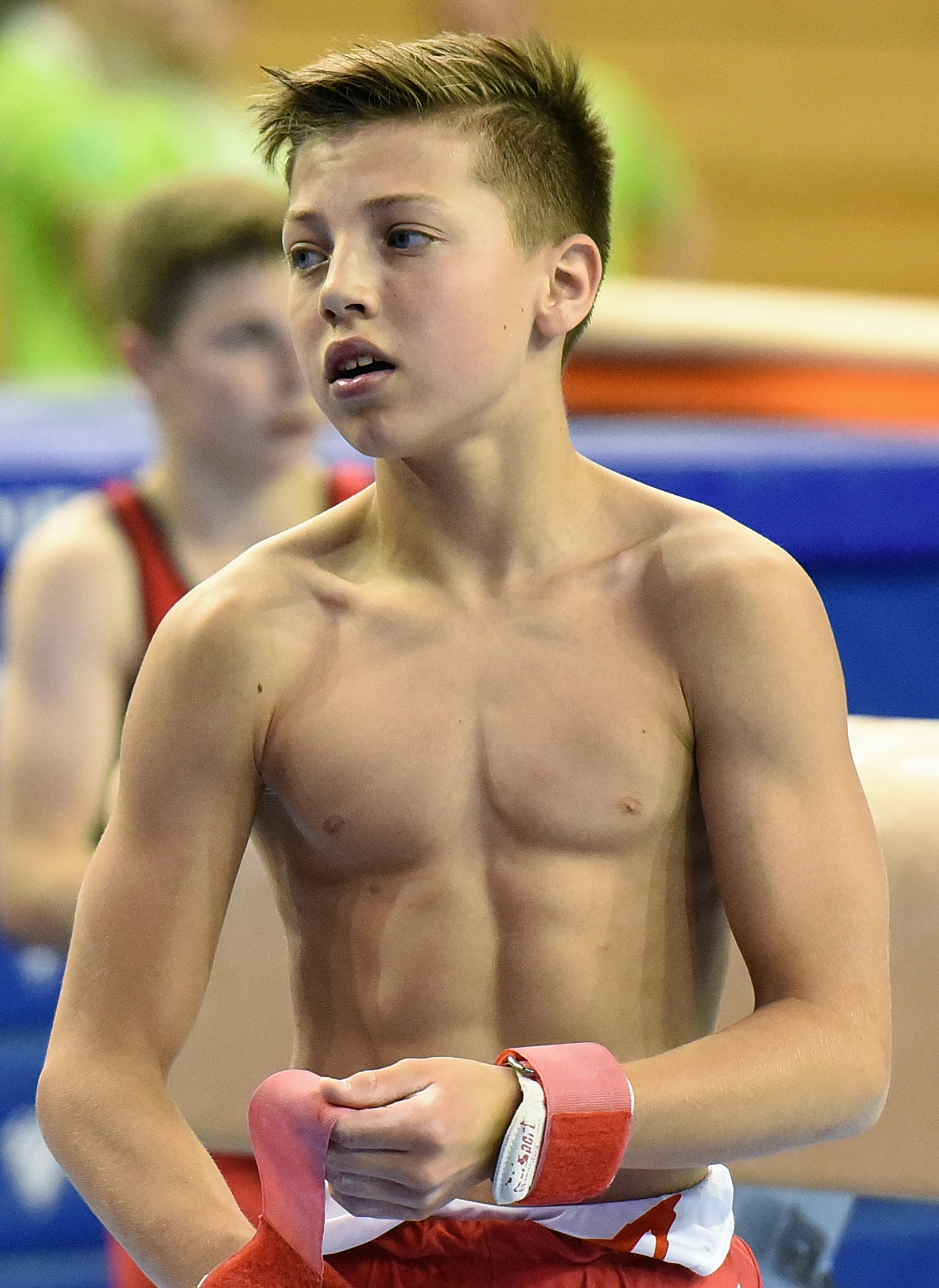 Deutsche Jugendmeisterschaften Gerätturnen männlich AK 13/14 Einturnen Pflicht beim Internationalen Deutschen Turnfest Berlin 2017. Abgebildet: Pavel Kostyukhin.